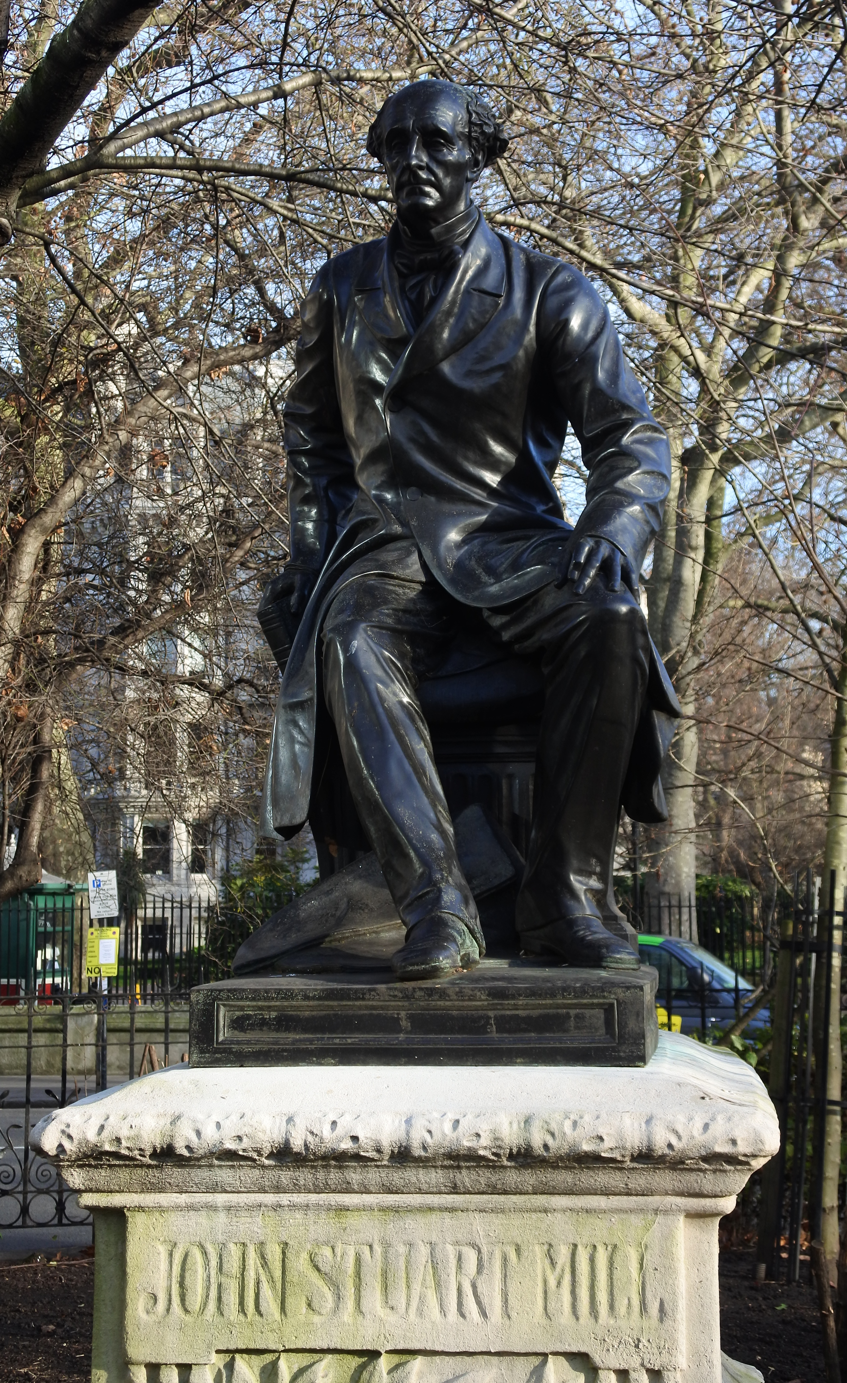 Victoria Embankment Gardens, London